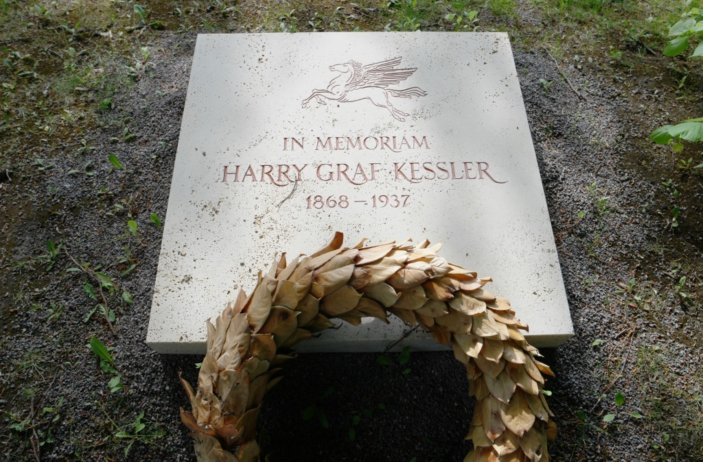 Gedenkplatte für den Kunstsammler, Mäzen, Schriftsteller, Publizisten und Diplomaten Harry von Kessler (1868-1937) auf dem Alten St. Matthäus Kirchhof in Berlin-Tempelhof.